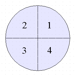 De vier kwadranten in de Wiskunde, getekend in een cirkel. (eigen afbeelding, gemaakt met OpenOffice, beschikbaar gesteld onder Gnu FDL)